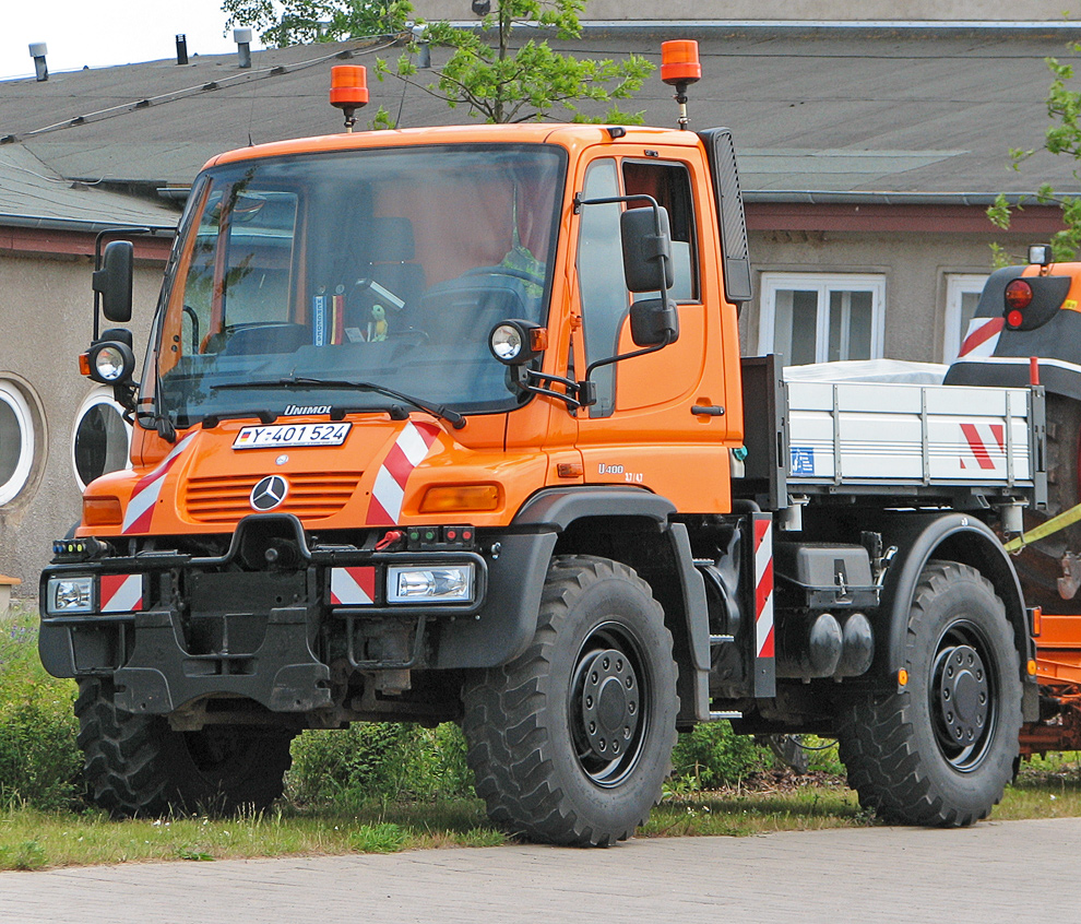 Dieses Bild zeigt einen Unimog U400 im Einsatz bei der Bundeswehr.